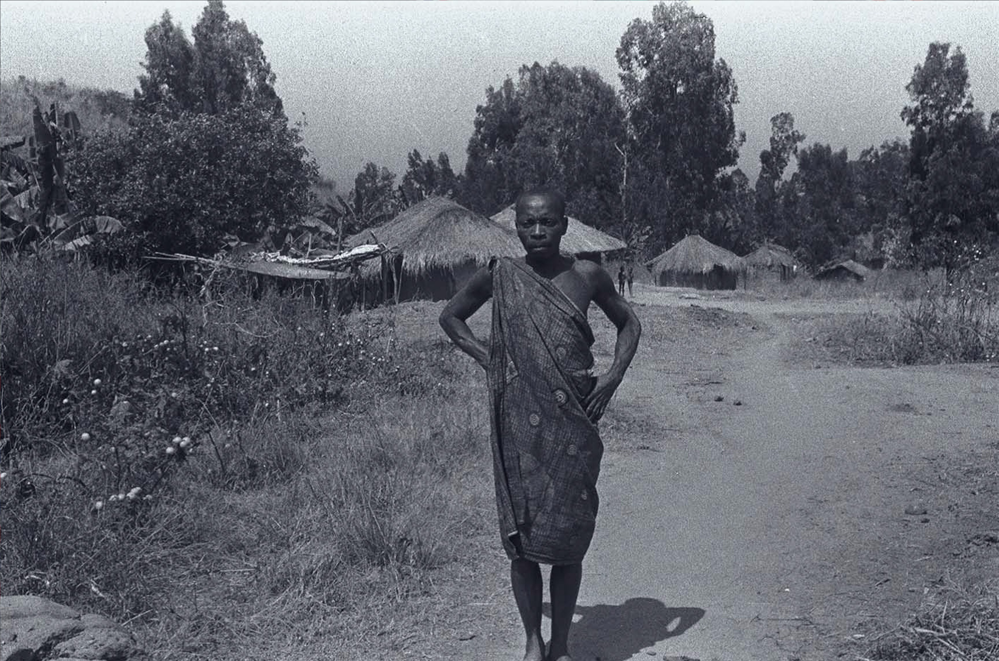 Image offerte a la communauté mondiale par Gorges Weis, tirée de sa brochure "Itombwe... mon amour Le pays d'Uvira de 1954 au 21e siècle", 1999 inédit